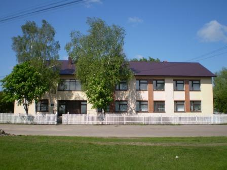 Нова школа